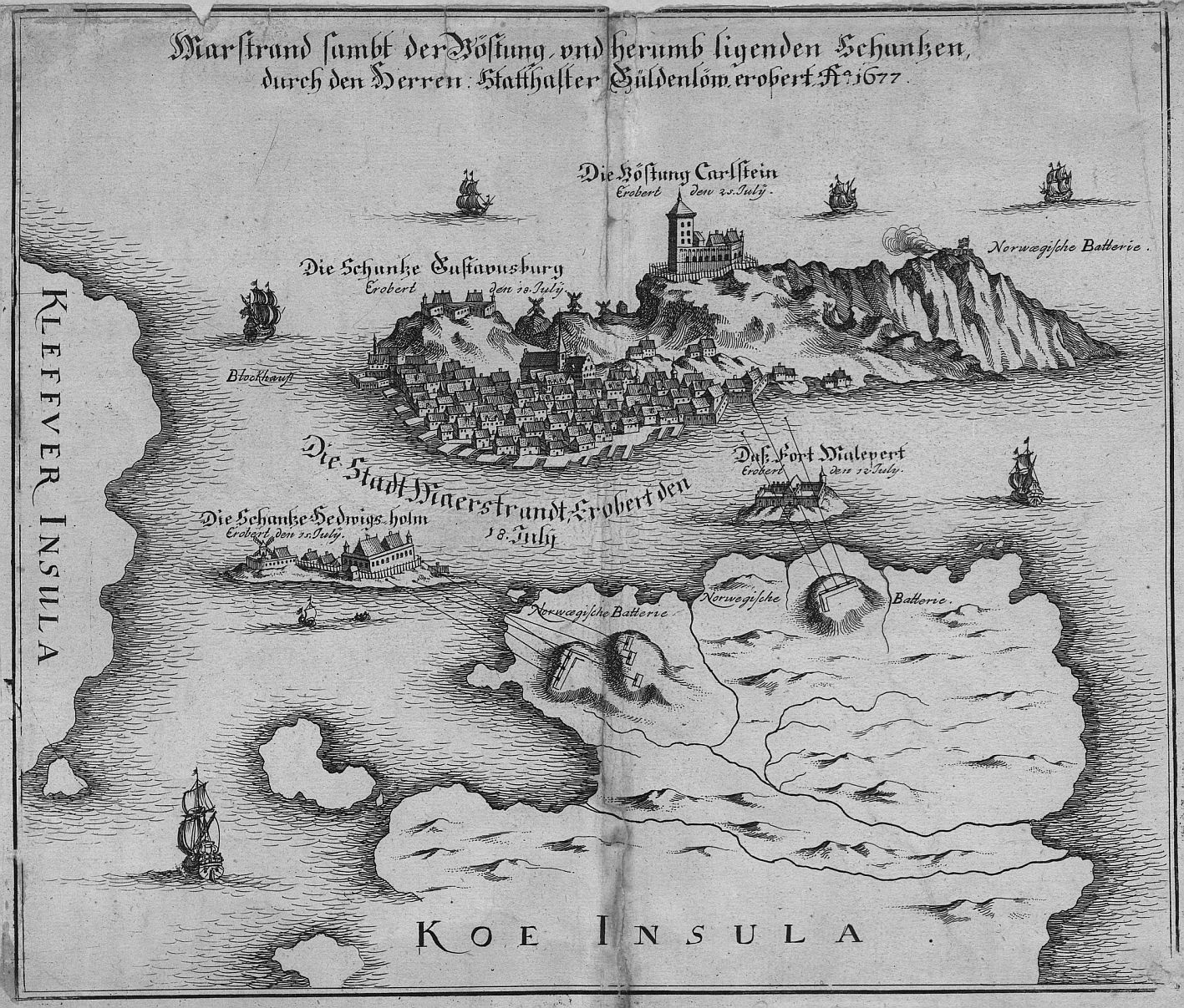 Belägringen av Marstrand sommaren 1677 av norsk här under Gyldenlöwes befäl.